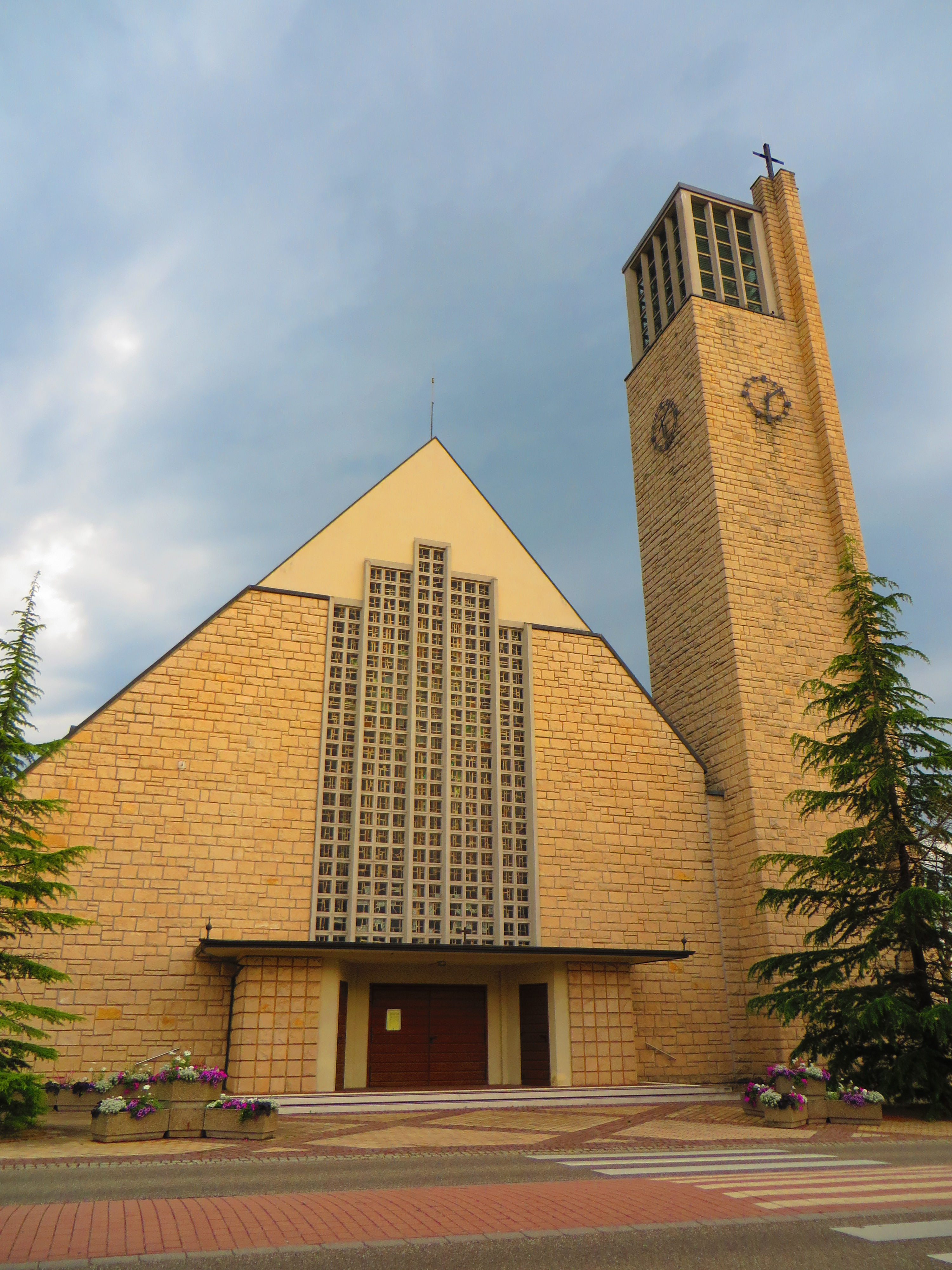 Willerwald Église Saint-Nicolas